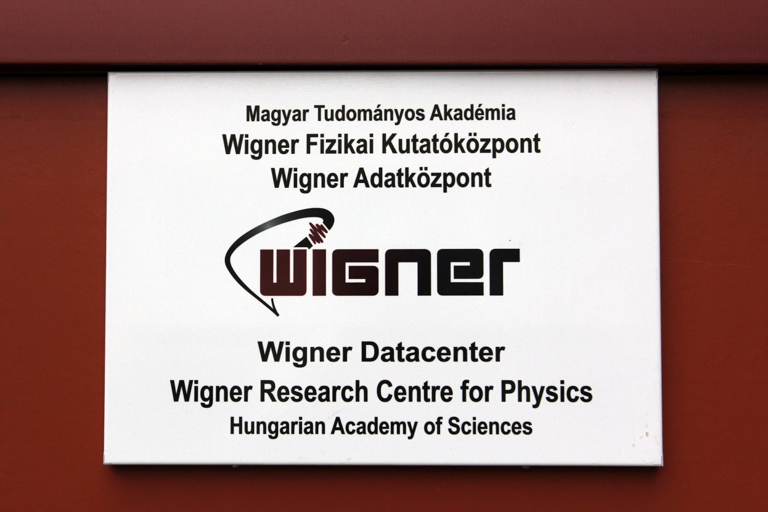 Wigner adatközpont táblája a KFKI területén